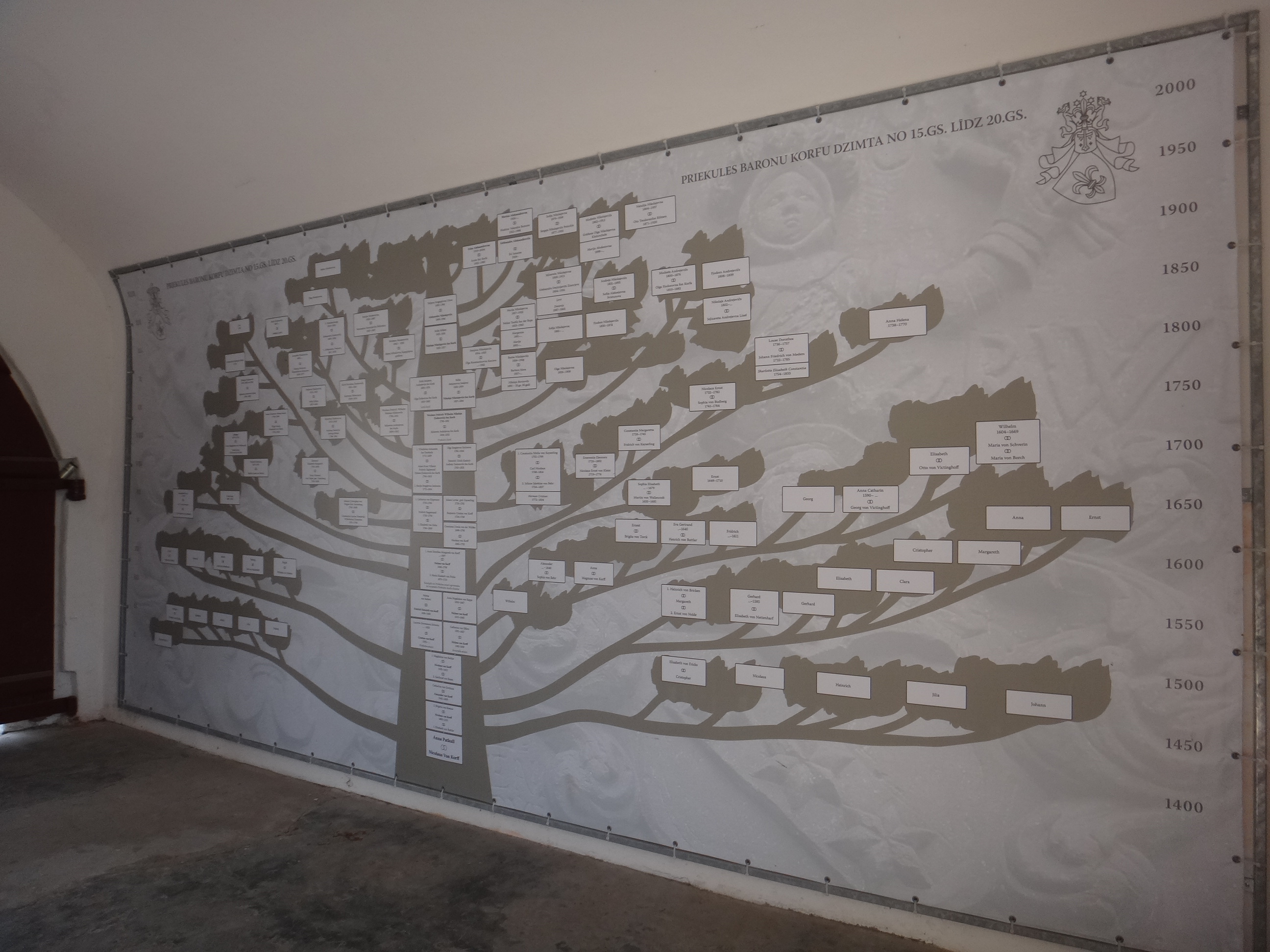 Генеалогическое дркво Корфов внутри Шведских Ворот (на 2015 год)